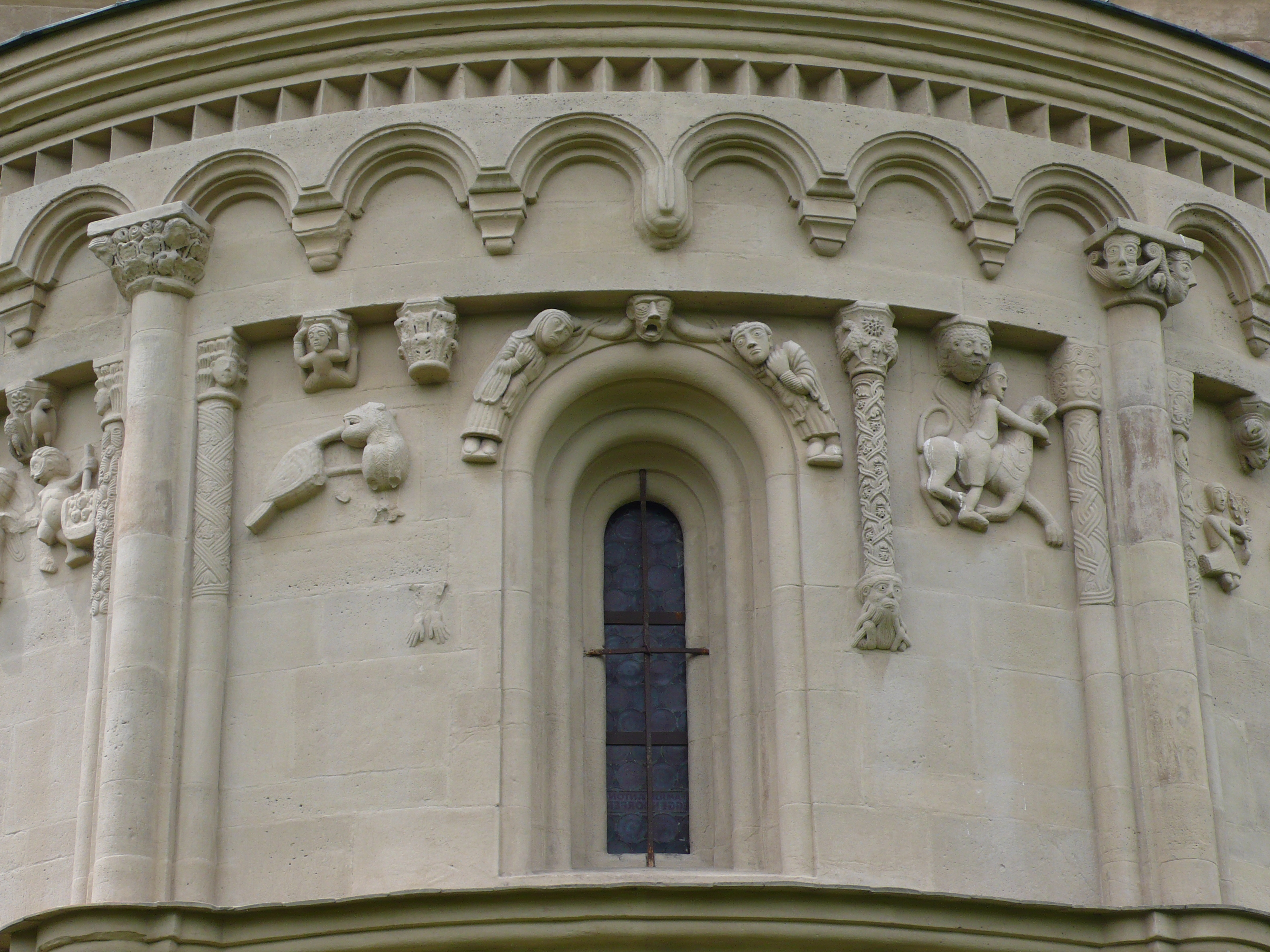 Schöngrabern, Niederösterreich, spätromanische Pfarrkirche, Apsis, Reliefdarstellungen